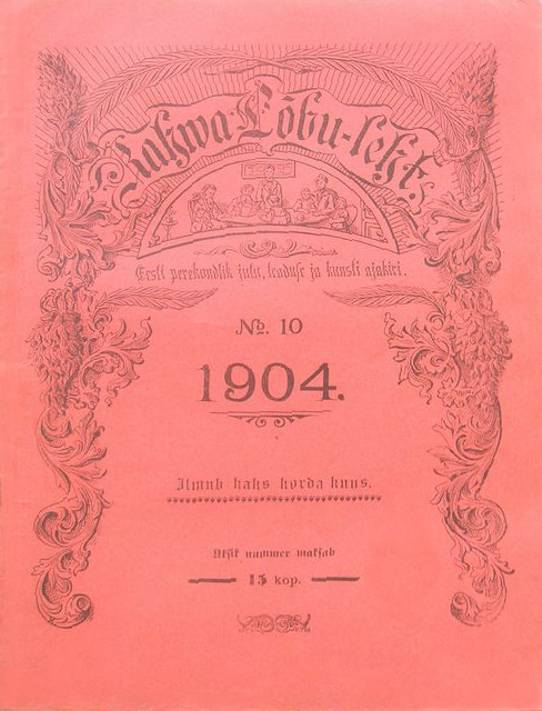 Rahwa Lõbuleht, esikaas